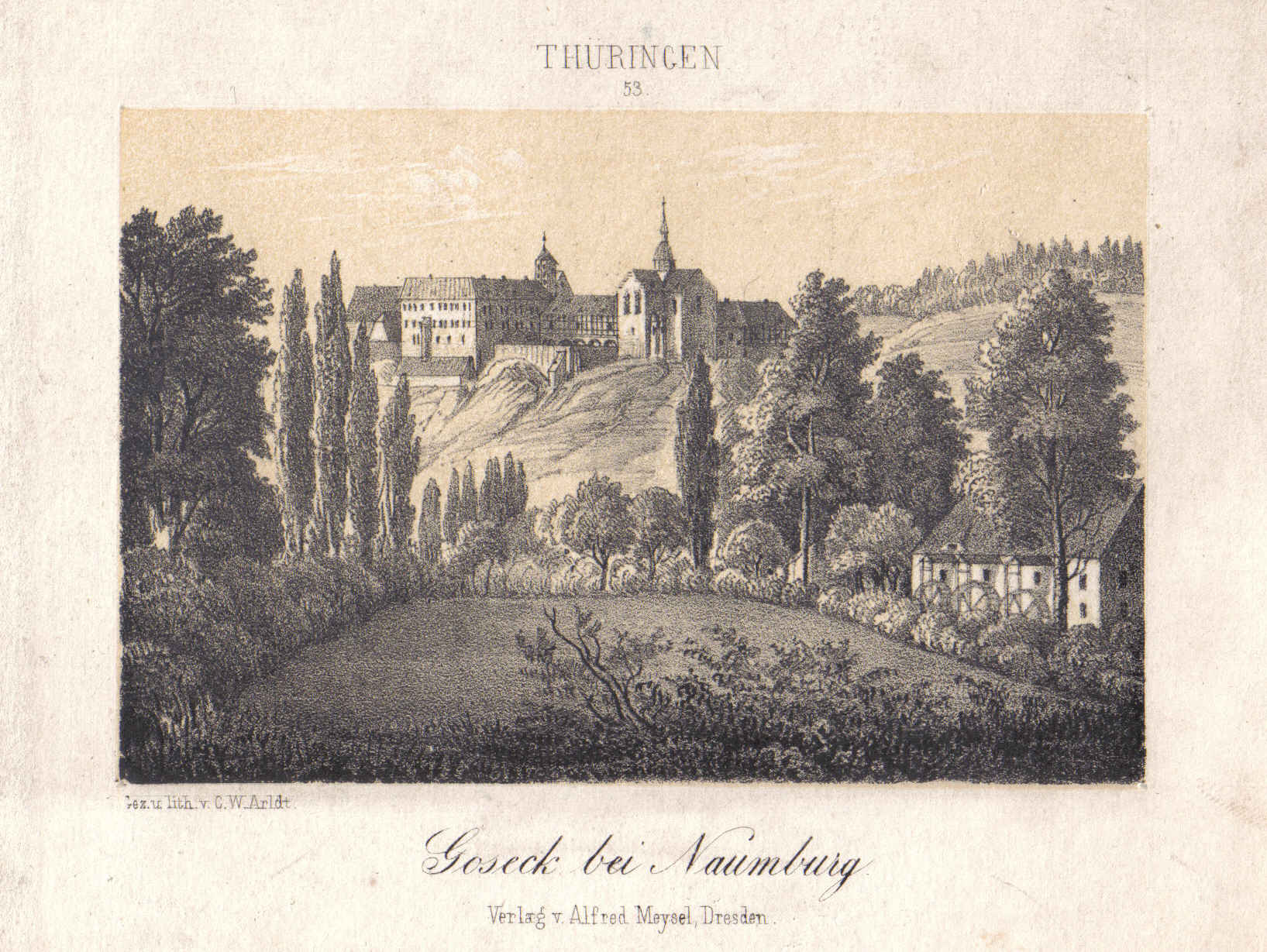 de: Schloss Goseck bei Naumburg/Saale, Lithographie / en: Goseck Castle near Naumburg/Saale, lithograph